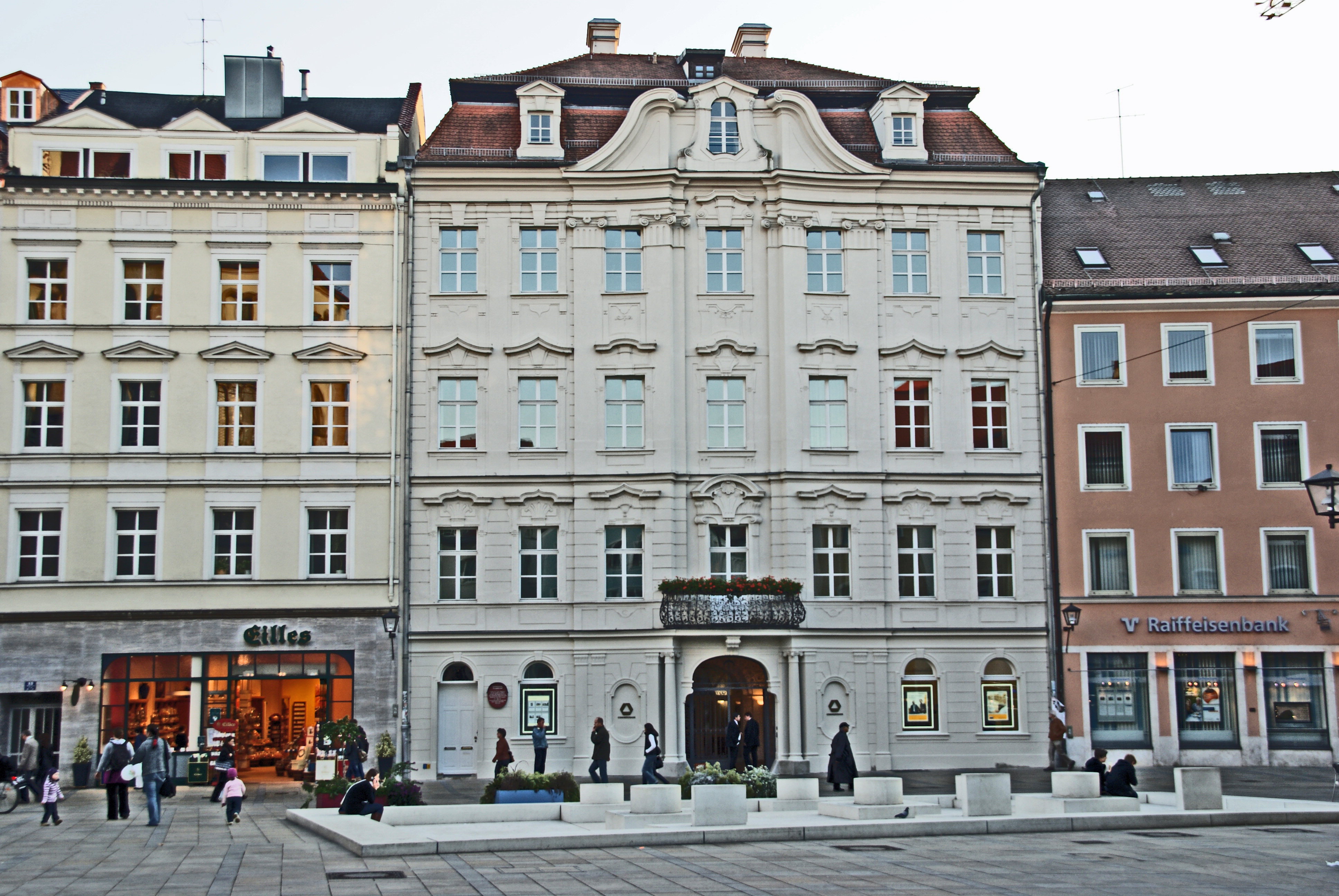 Löschenkohl Palais in Regensburg, ehemalige kursächsische Gesandtschaft, 1733 von Johann Michael Prunner für den Bankier Löschenkohl errichtet